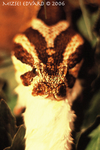 Palesztin vipera